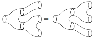 Frobenius algebra, Topologisk Kvantefeltteori: Co-kommutativitet af co-multiplikation